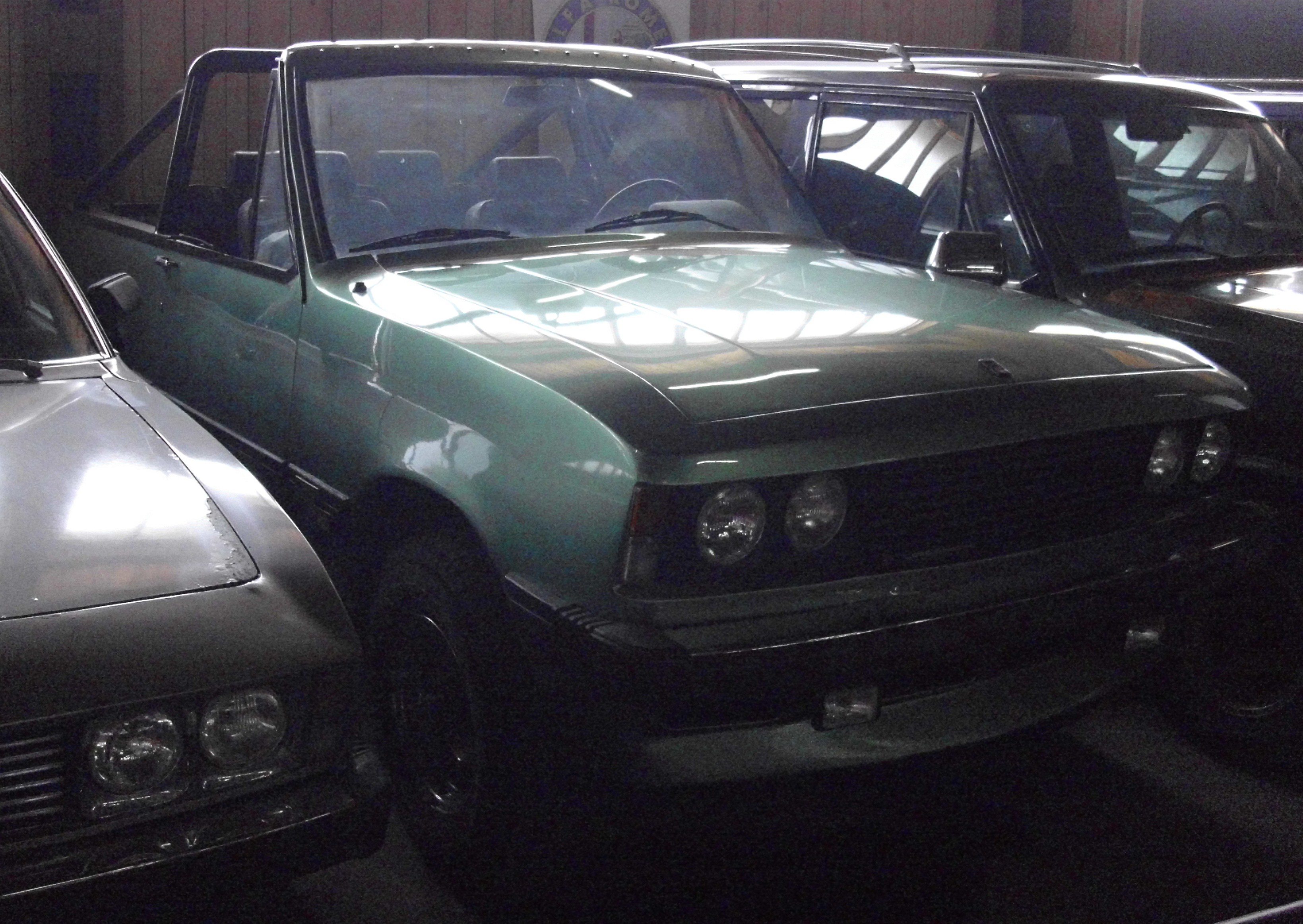 Monteverdi Safari Cabrio 1979 im Kraftfahrzeugmuseum Sigmundsherberg